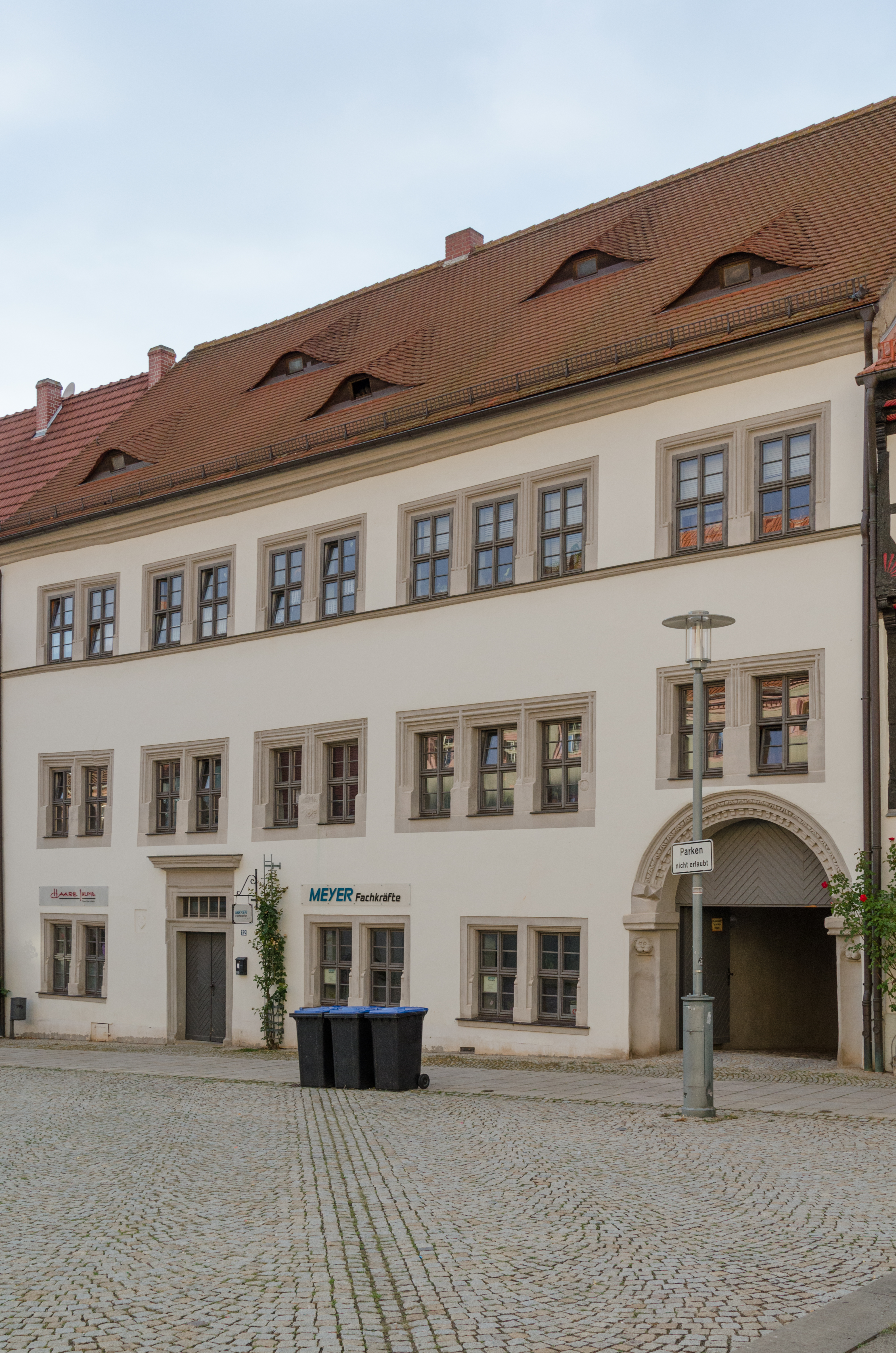 Sangerhausen, Markt 12